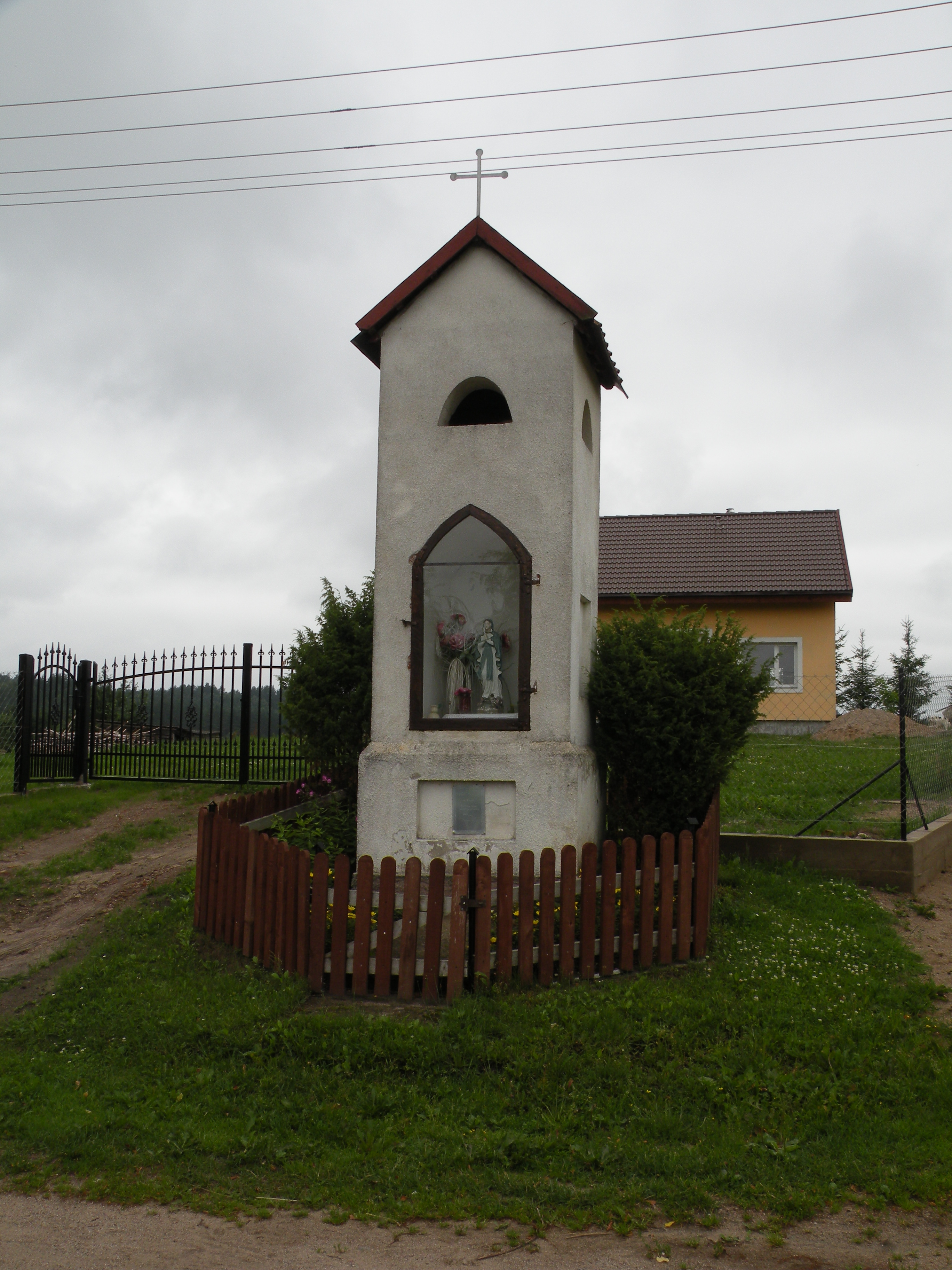 Rasząg